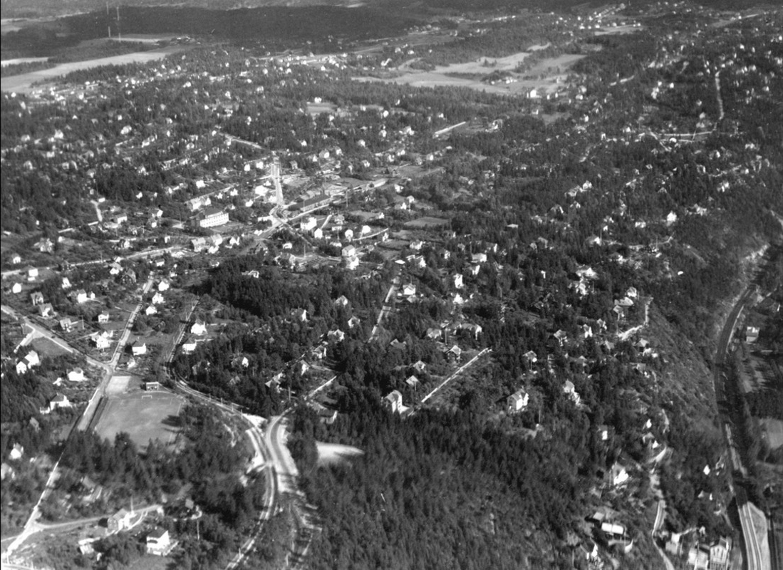 Bekkelagshøgda, Oslo. Ekebergbanen og Sportsplassen nede til venstra. Skrenten ned mot Østfoldbanen til høyre. Nordseter gård i bakgrunnen.